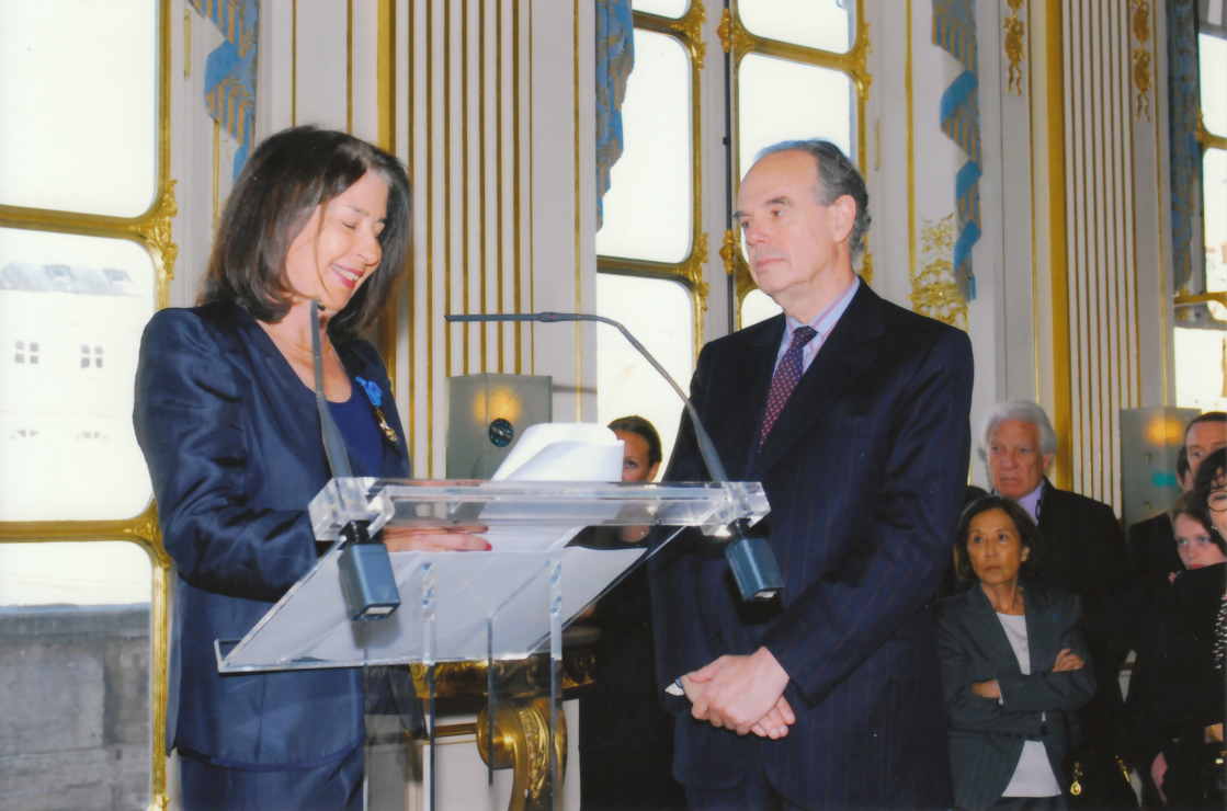 Frédéric Mitterrand remet les insignes d’officier dans l’ordre national du Mérite à Isabelle Gallimard, le 26 septembre 2011, au Ministère de la Culture, rue de Valois.